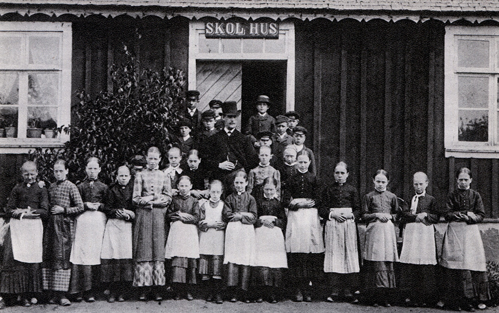 Folkskolan i Snöstorp, Halland